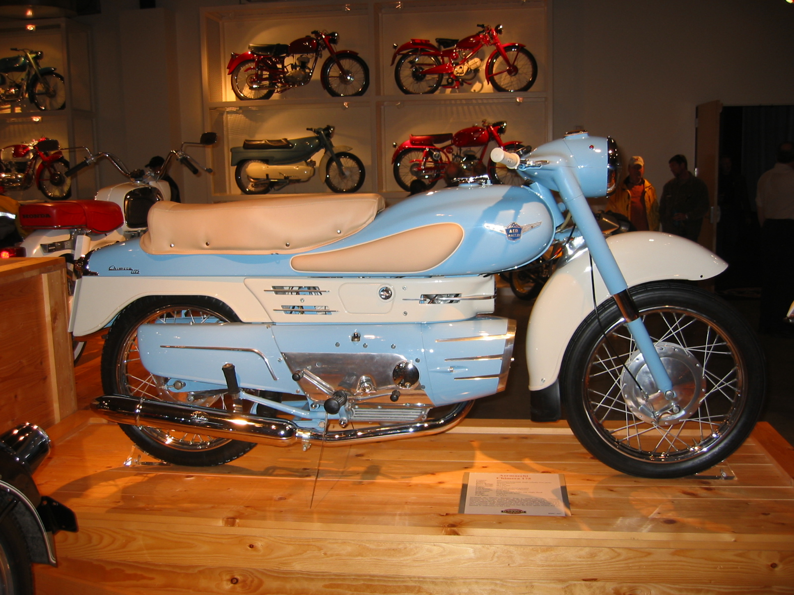 Aermacchi Chimera 175, disegnata da Mario Revelli di Beaumont e prodotta in 119 esemplari dal 1956 al 1961